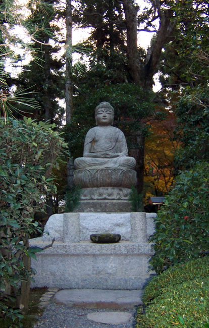 A buddha statue at Ryoanji temple.